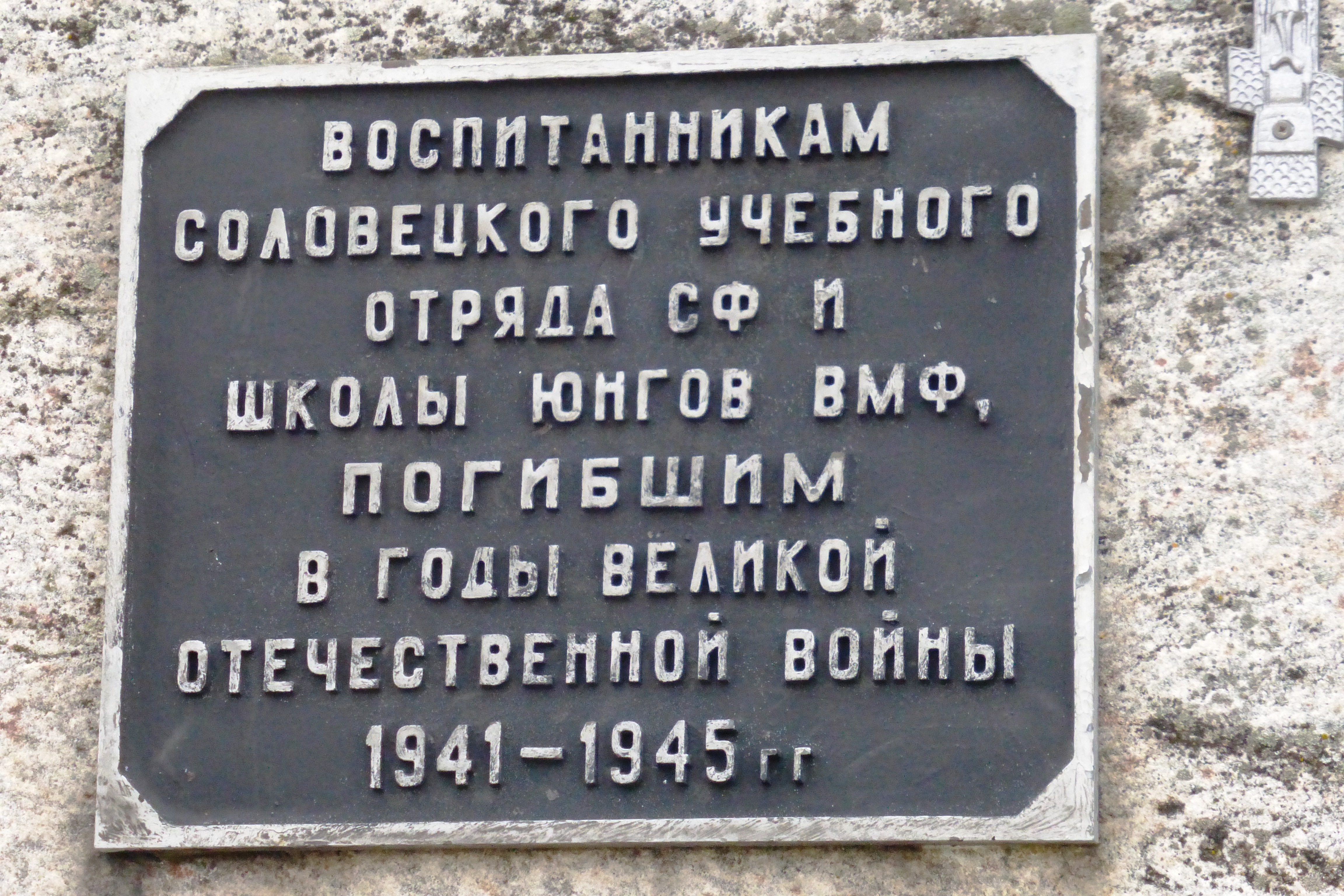 Памятник на б.Соловецком острове (пос.Соловецкий)